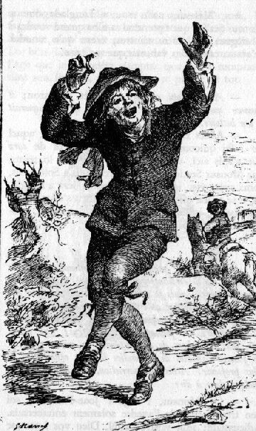 Illustracion de Joan l'an-pres de l'abat Fabre per marsal